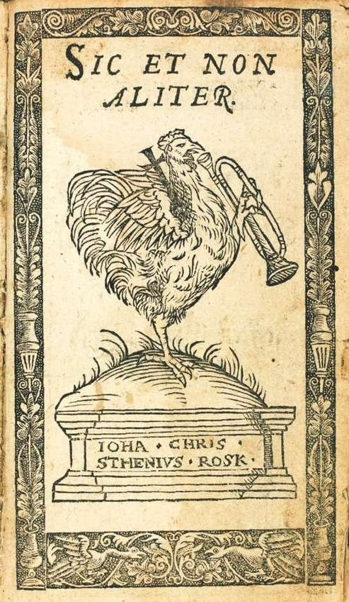 Emblem und Wahlspruch von Hans Christensen Sthen (1544-1610) in En liden Haandbog (1578)